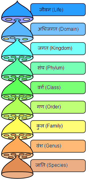 यह हिंदी में जीववैज्ञानिक वर्गीकरण के लिए एक चित्र है जिसमें अंग्रेज़ी और हिंदी में श्रेणियों के नाम दिए गए हैं - यह नेपाली और अन्य देवनागरी इस्तेमाल करने वाली संस्कृत-आधारित भाषाओँ के लिए भी इस्तेमाल हो सकता है